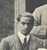 M.O.T. Iyengar